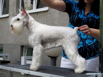 Цвергшнауцер белый Питомник "Ассон Ари"